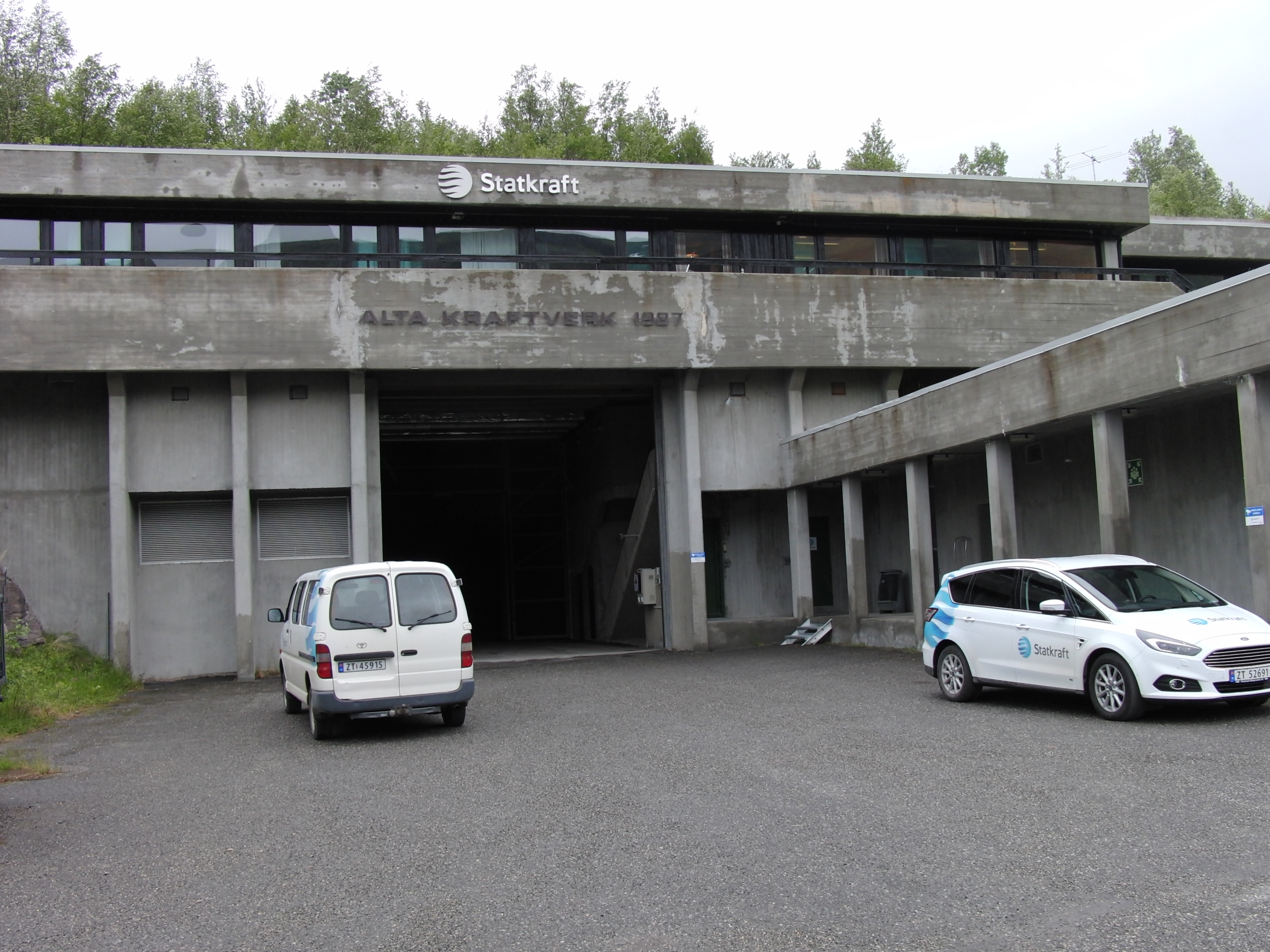 Alta kraftverk